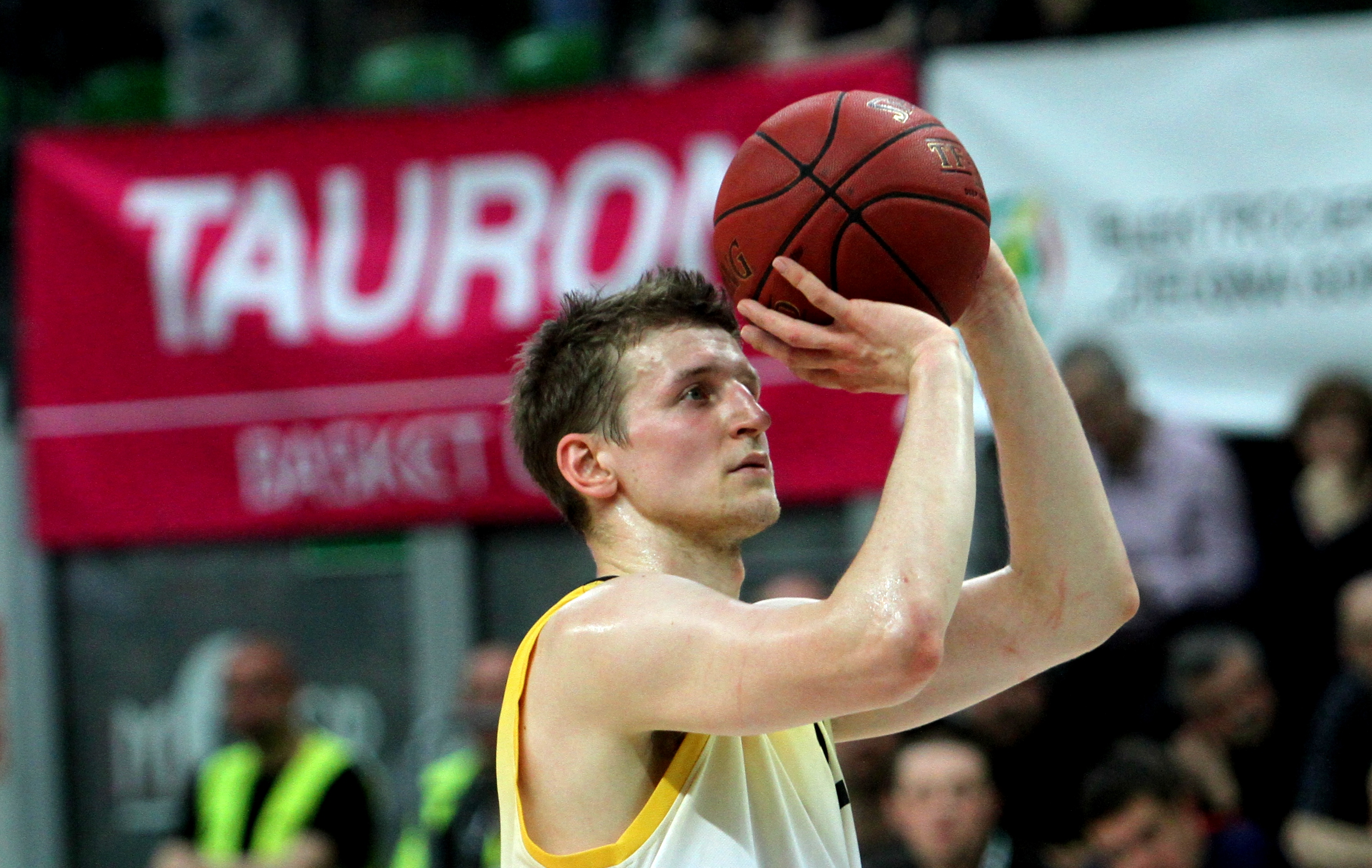 Adam Waczyński Trefl Sopot